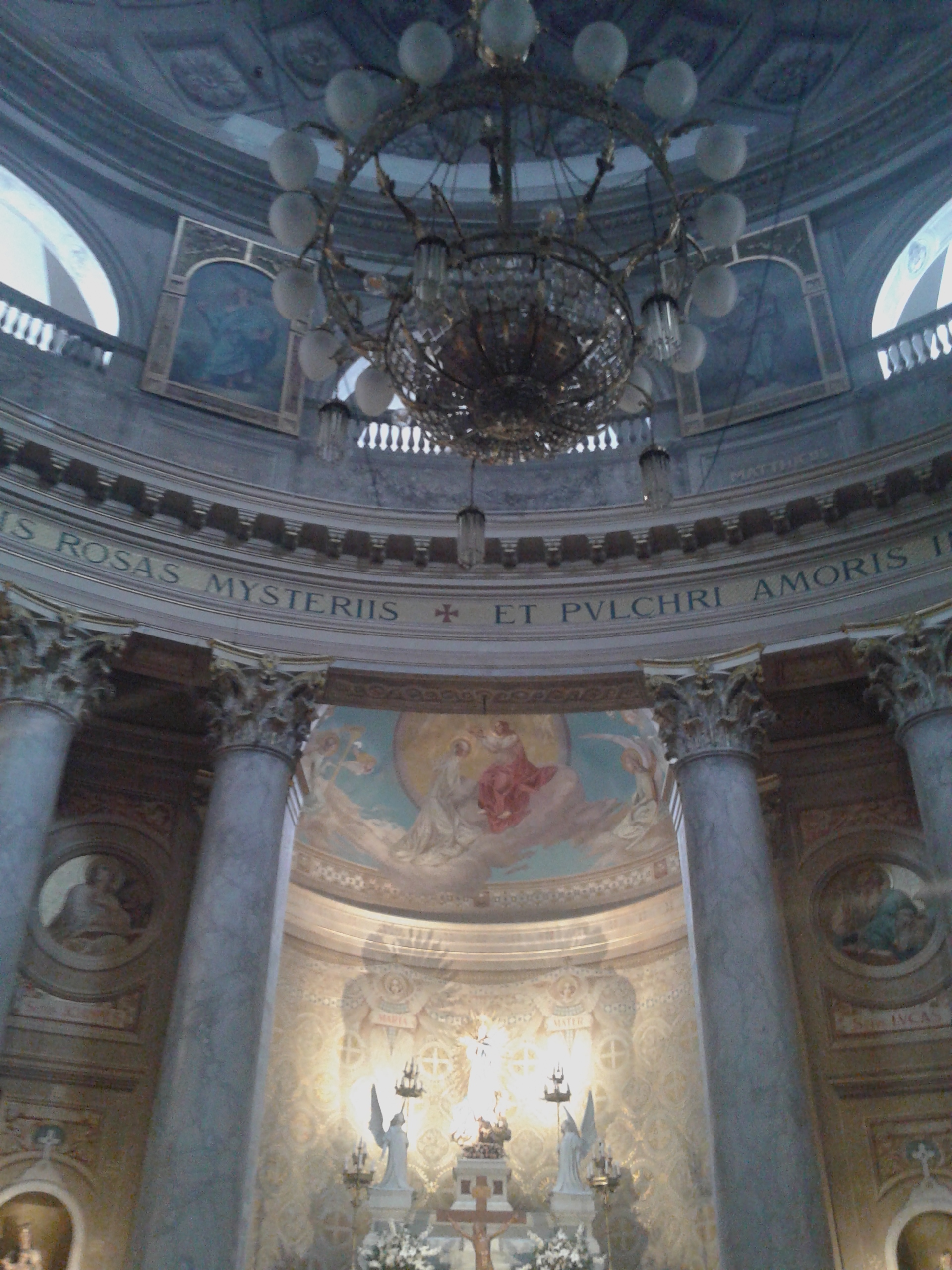 Interior de la Parroquia